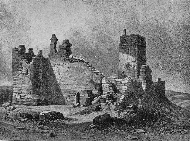 Les ruines du château de Trémazan (dessin publié en 1901 dans le livre de G. Vallée et P. Parfouru "Mémoires de Charles Gouyon, baron de La Moussaye (1553-1587), publiés, d'après le manuscrit original").